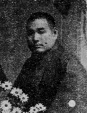 Unkyo Iizuka